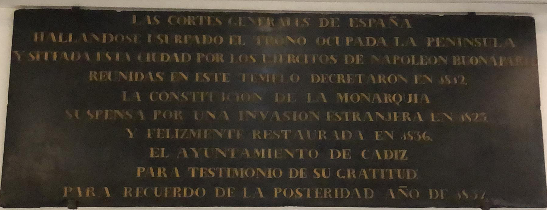 Iiiw